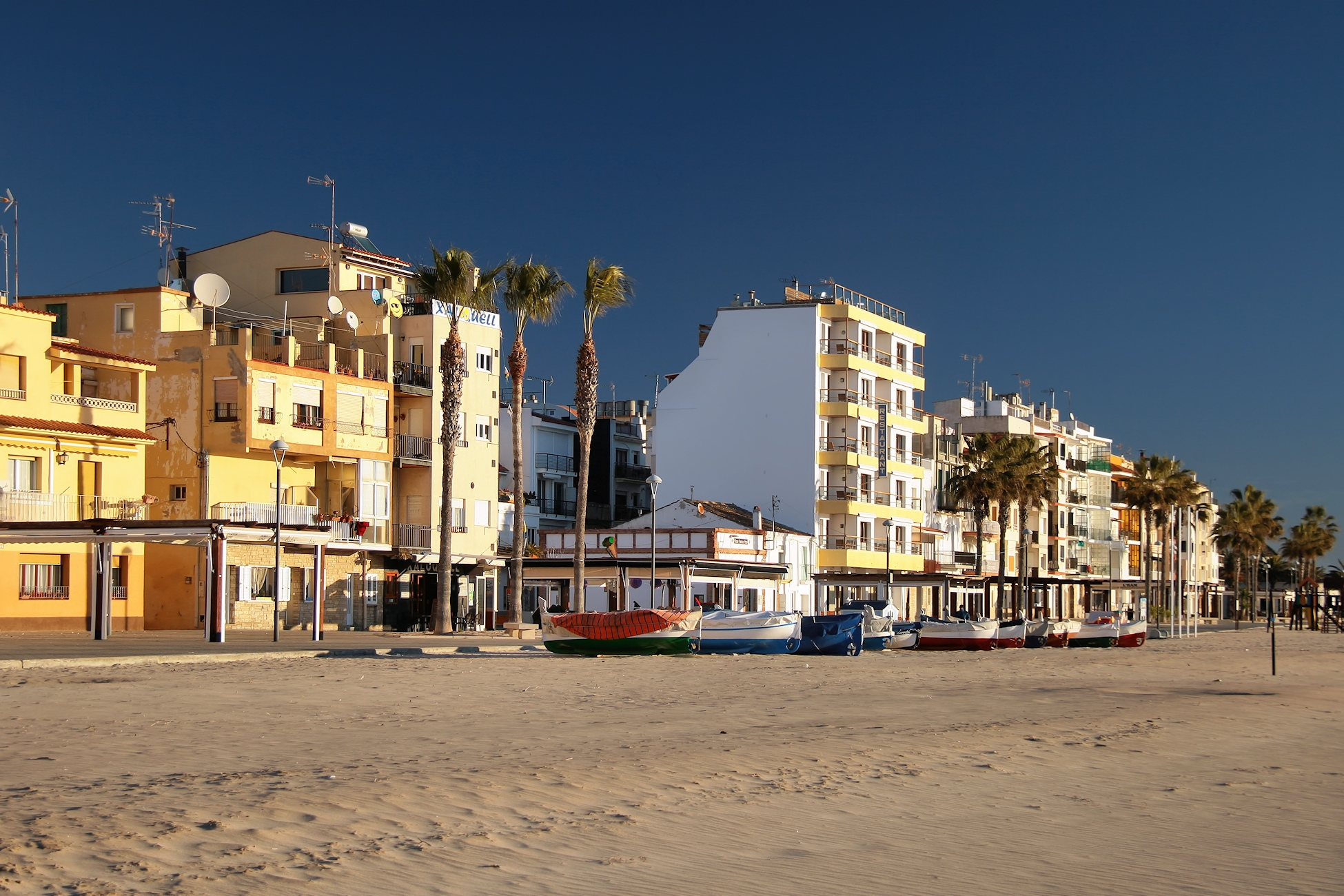 Platja del Barri Marítim